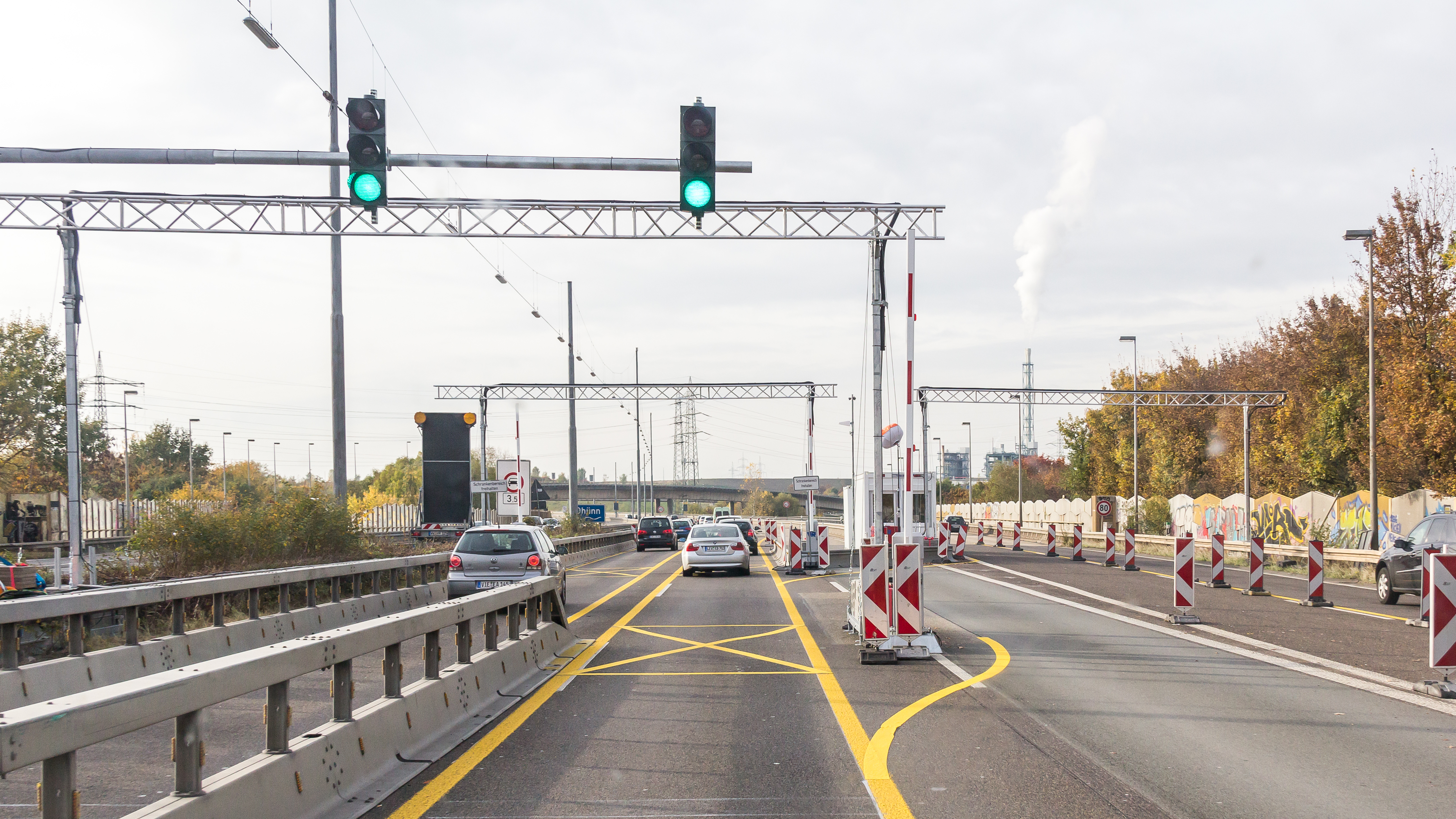 Rheinbrücke Leverkusen - Sperranlagen A1 zur 3,5 t-Gewichtsbeschränkung - auf Leverkusener Seite mit Fahrrichtung Köln (Westen) Foto: Ampel- und Schrankenanlage; rechts die Notausfahrt für Fahrzeuge, die alle bisherigen Verbotsschilder ignoriert haben